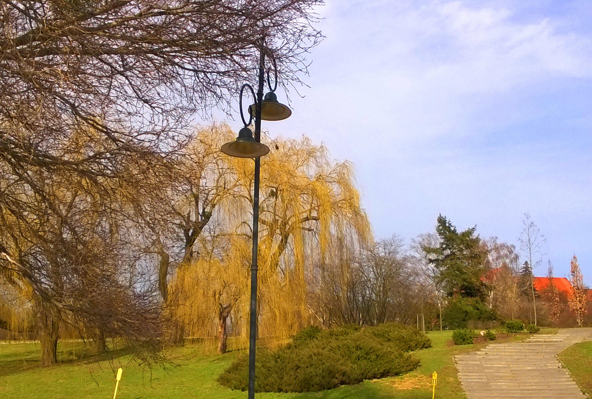 Dolina Marzeń, wiosna 2017